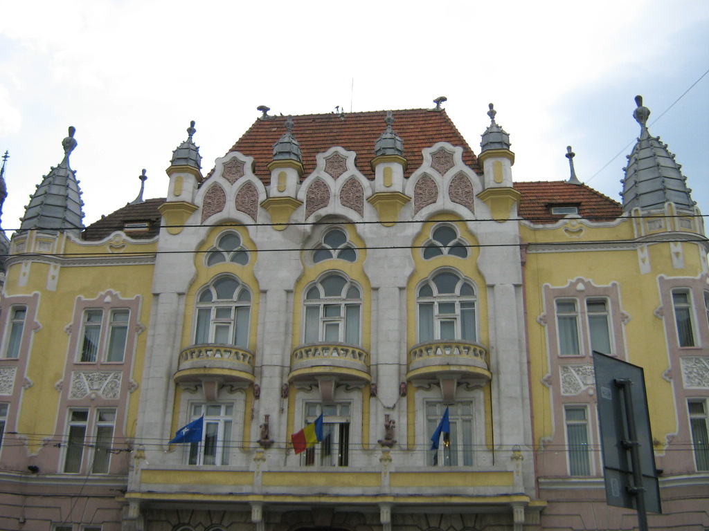 Palatul Prefecturii din Cluj-Napoca - Kolozsvári megyeháza